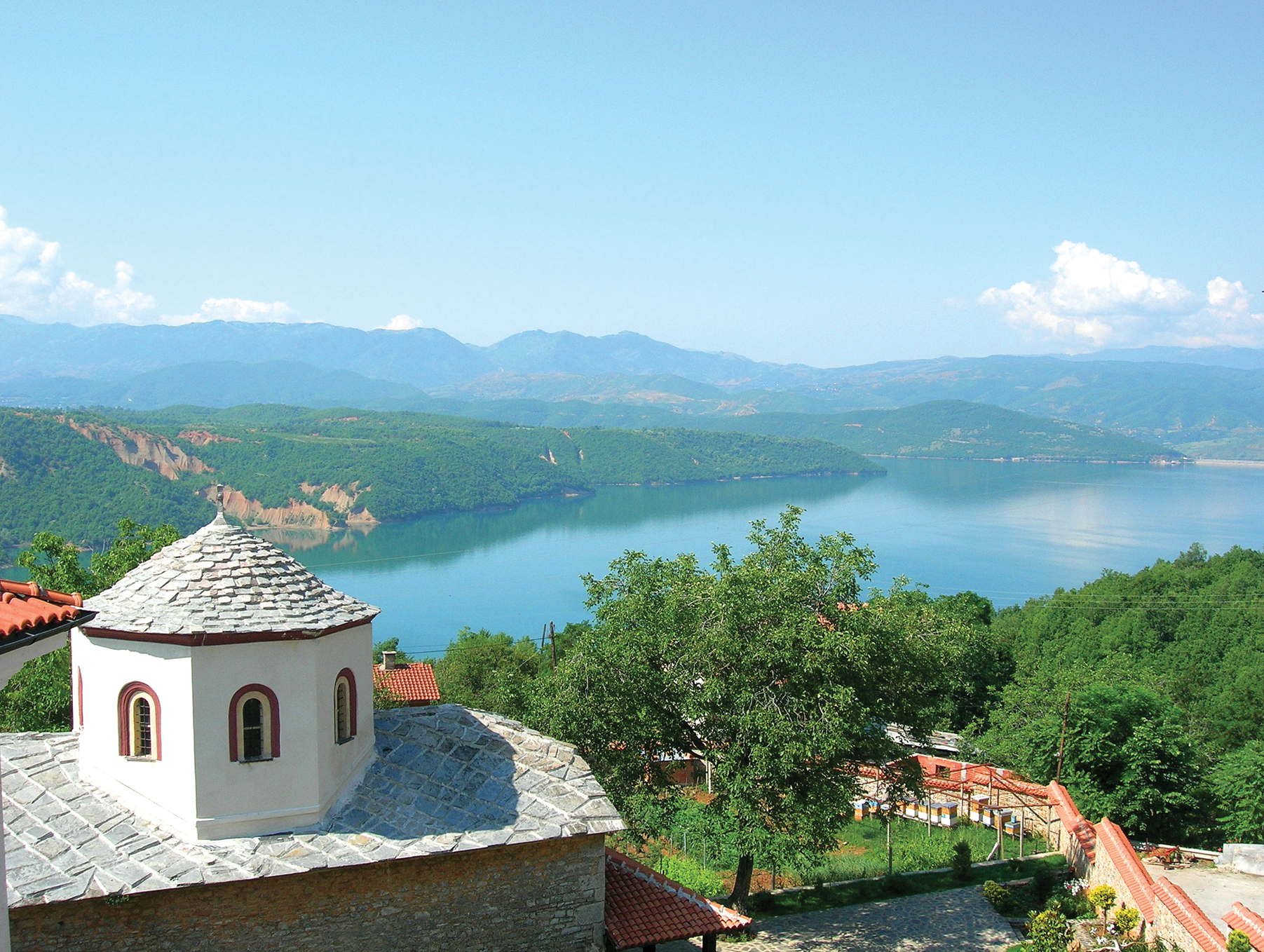 Манастирот „Свети Ѓорѓи Победоносец“ во село Рајчица, Македониjа и Дебарското Езеро